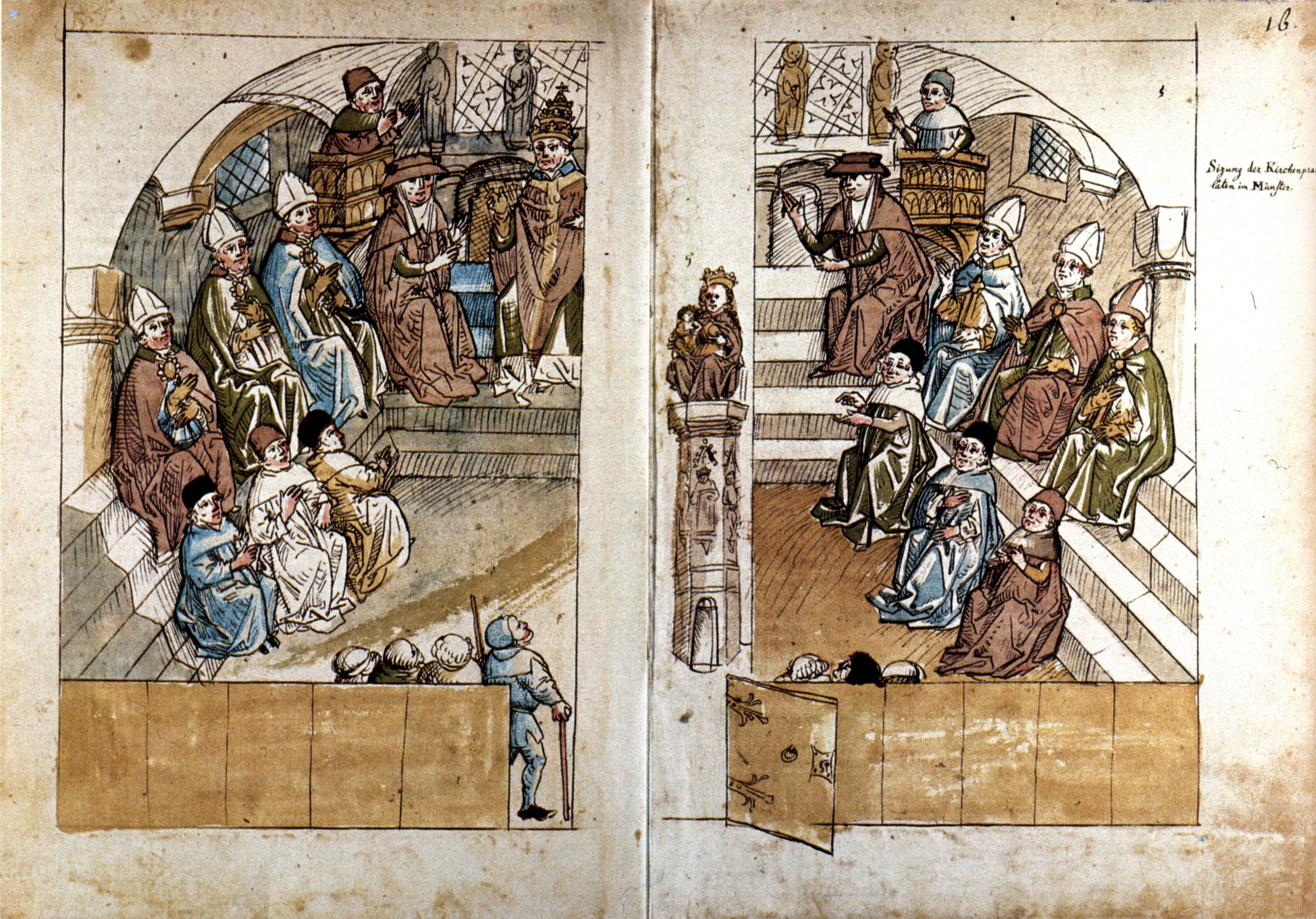 Chronik des Konzils von Konstanz des Ulrich Richental, Szene: Sitzung der Gelehrten, Bischöfe, Kardinäle und des Papstes Johannes XXIII. im Konstanzer Münster